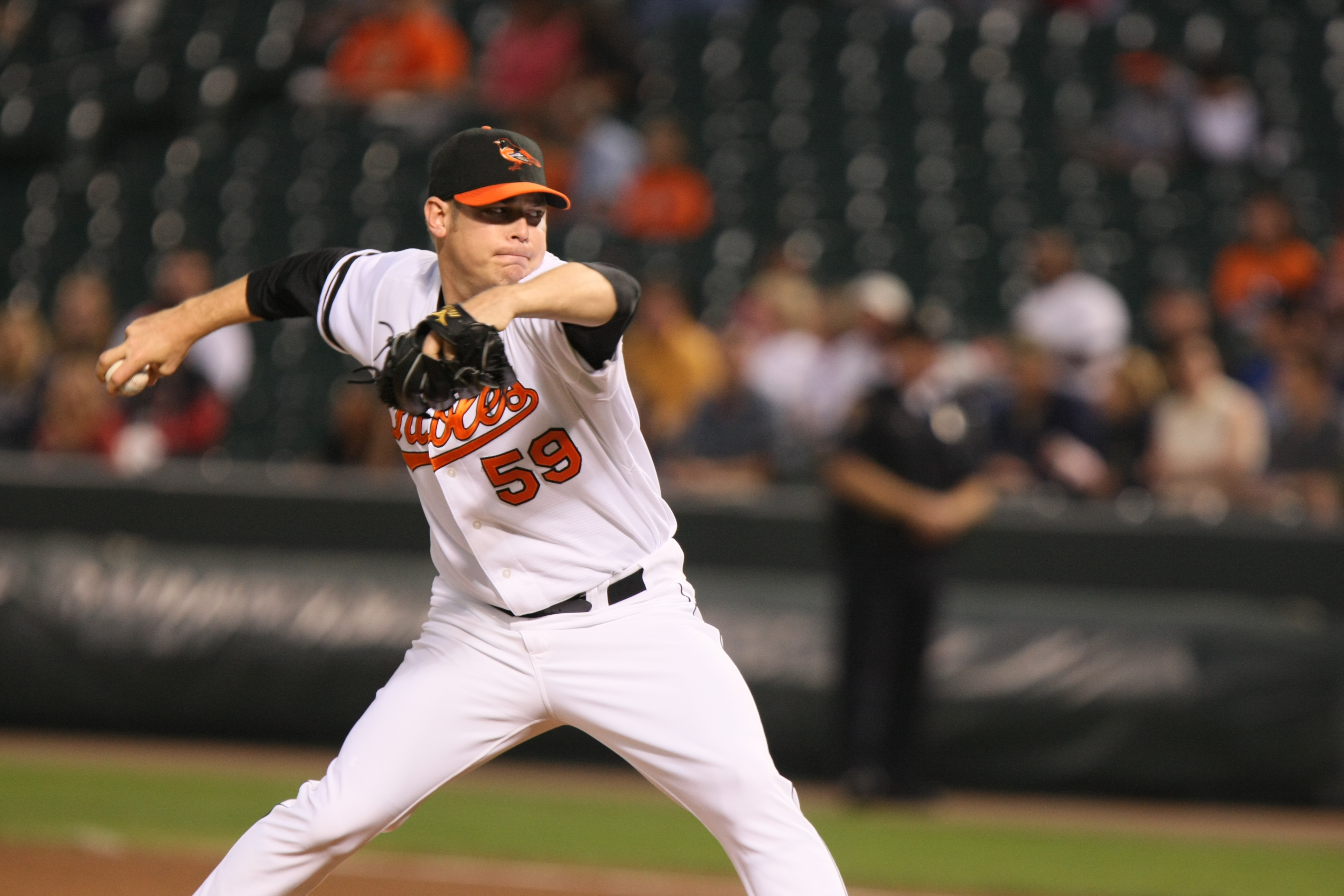 Brian Bass